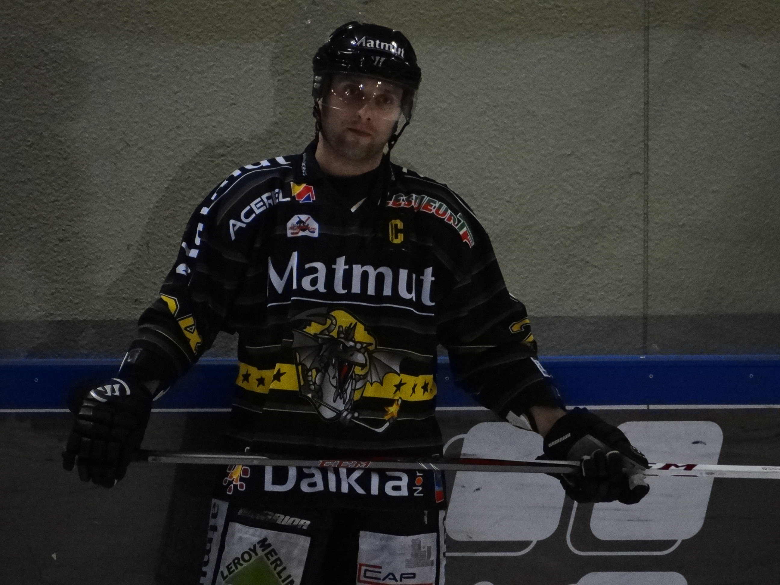 Photographie de Marc-André Thinel en 2013 lors du troisième match de la finale de la Ligue Magnus